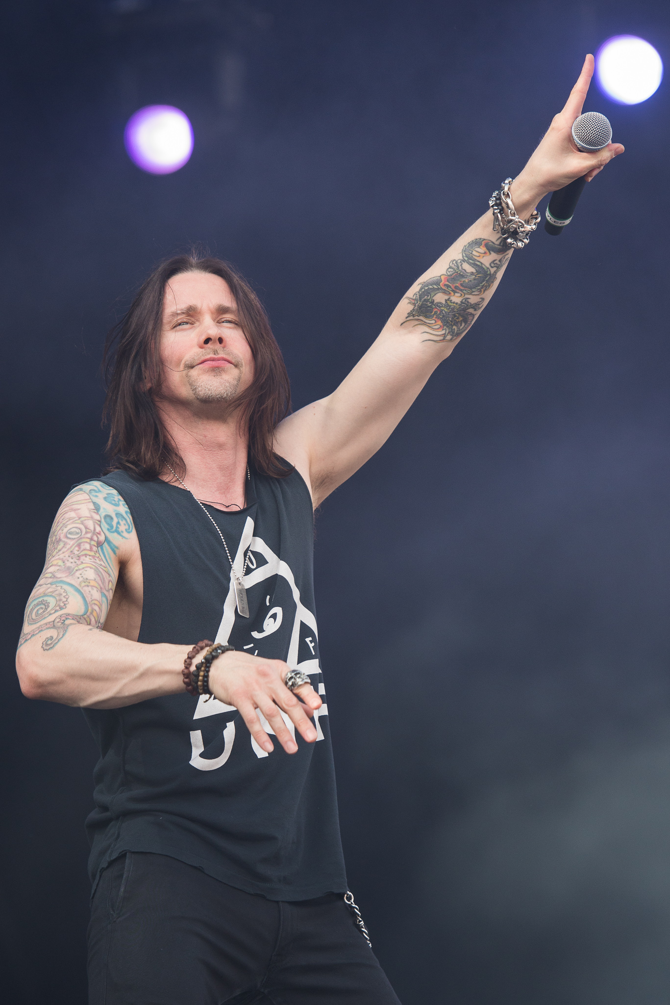 ARGO-Konzerte,Festival,Konzert,Livekonzert,Livemusik,Musik,Myles Richard Bass,RiP,Rock im Park 2015,Seat Zeppelin Stage,Slash feat. Myles Kennedy & The Conspirators